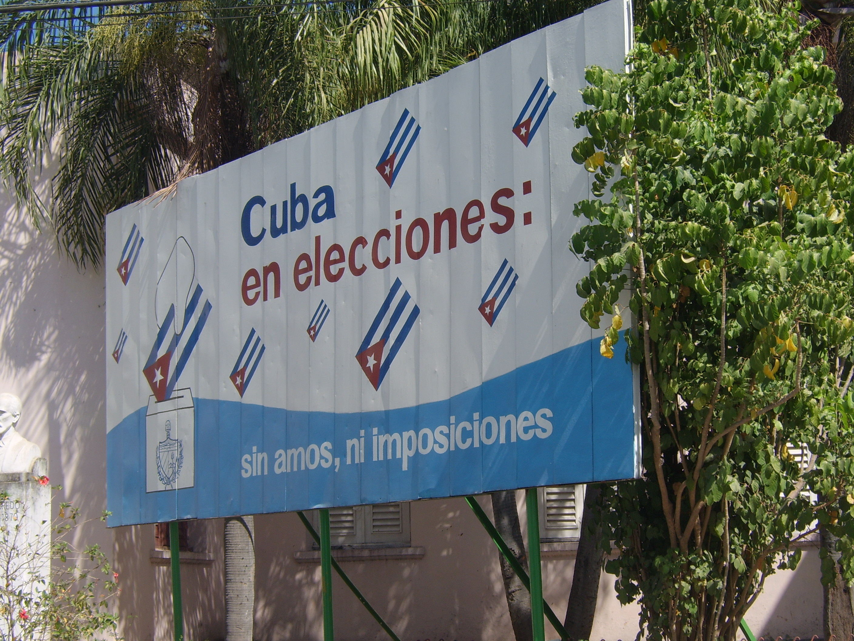 Electoral manifesto in Cuba